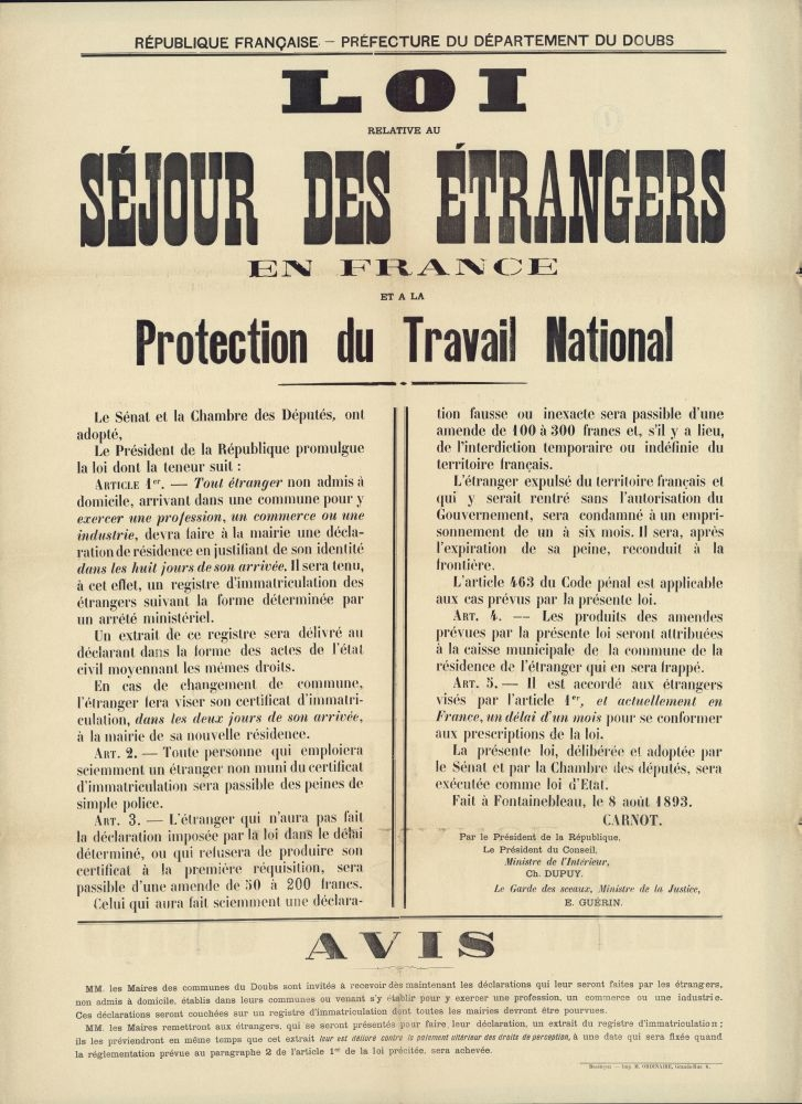 République française - Préfecture du département du Doubs Loi relative au séjour des étrangers en France et à la Protection du Travail National Le Sénat et la Chambre des députés ont adopté, Le président de la République promulgue la loi dont la teneur suit : ARTICLE 1er. - Tout étranger admis à domicile, arrivant dans une commune pour y exercer une profession, un commerce ou une industrie, devra faire à la mairie une déclaration de résidence en justifiant de son identité dans les huit jours de son arrivée. Il sera tenu, à cet effet, un registre d'immatriculation des étrangers [...] La présente loi, délibérée et adoptée par le Sénat et par la Chambre des Députés, sera exécutée comme loi d'Etat. Fait à Fontainebleau, le 8 août 1893. CARNOT [...]